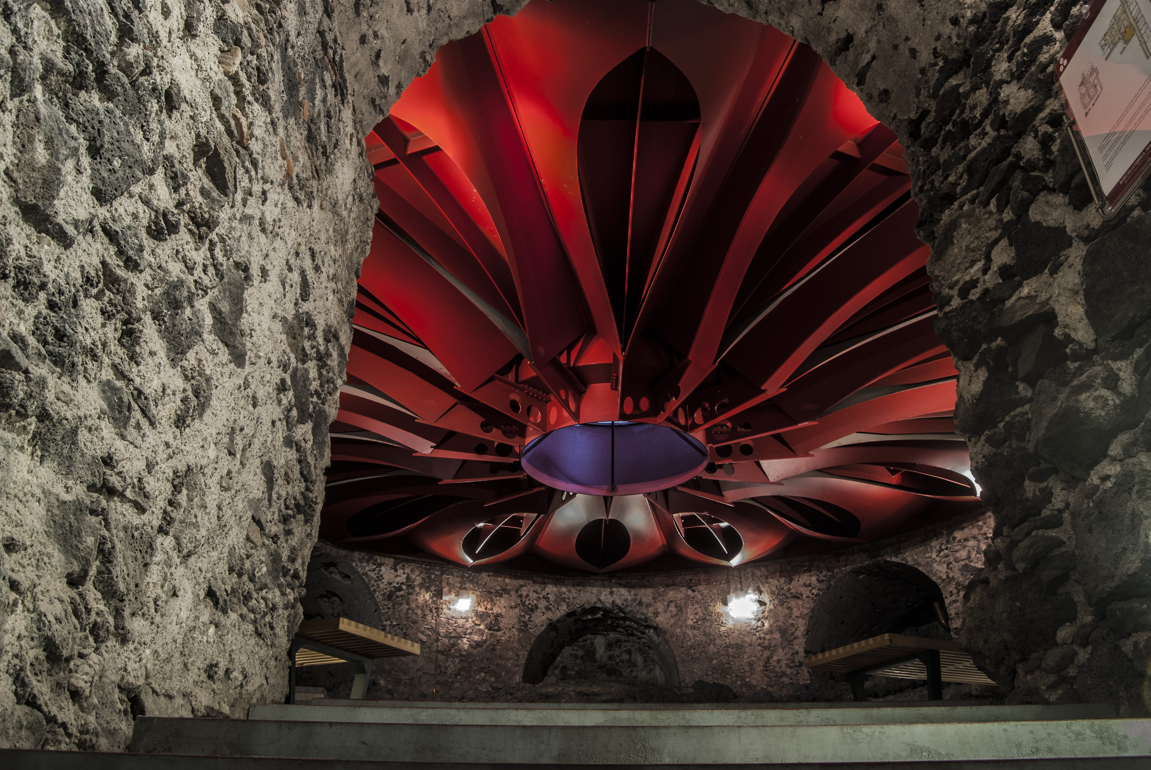 Sala Rossa progettata da Antonino Leonardi, geometra dell'ufficio tecnico d'ateneo